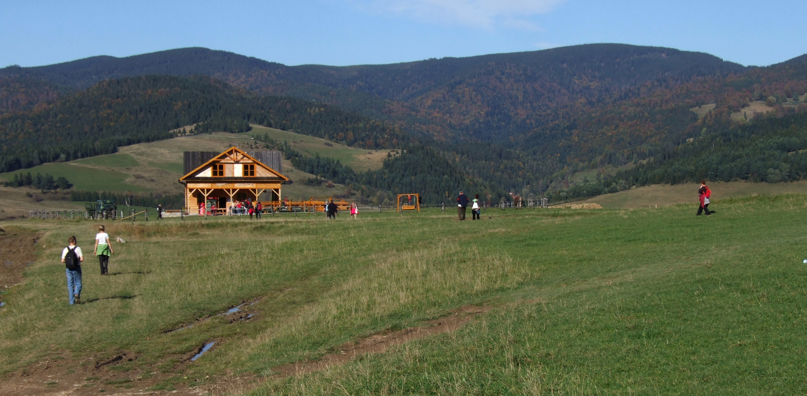 Powyżej bacówki w Jaworkach Świniarki, nad nimi 2 wierzchołki Złomistego Wierchu i Radziejowa